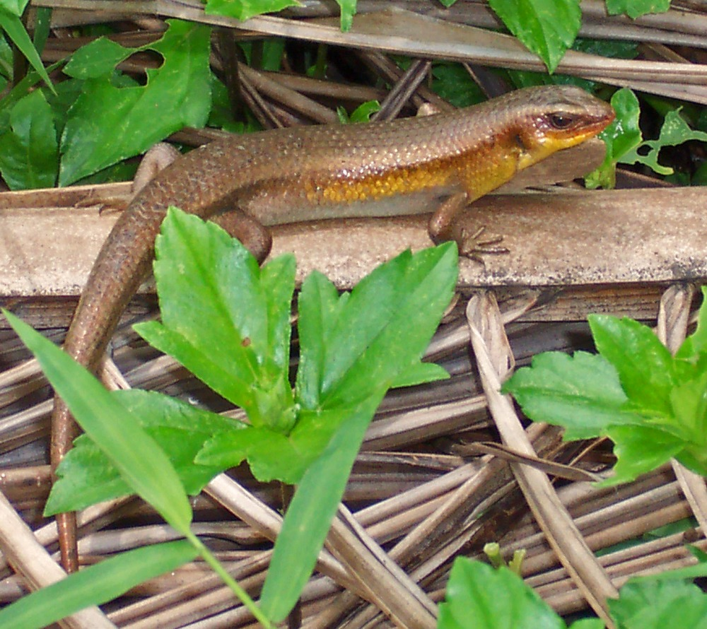 Mabuya multifasciata, male from Darmaga.